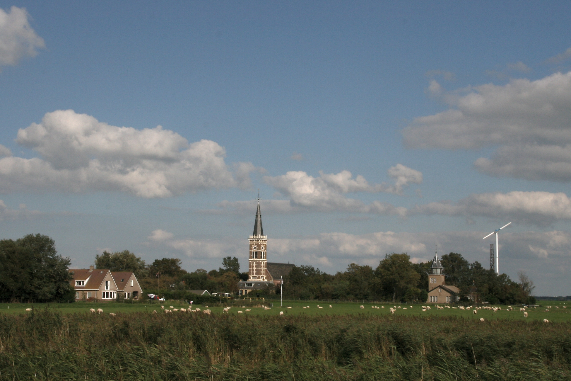 Cornwerd (Koarnwert)